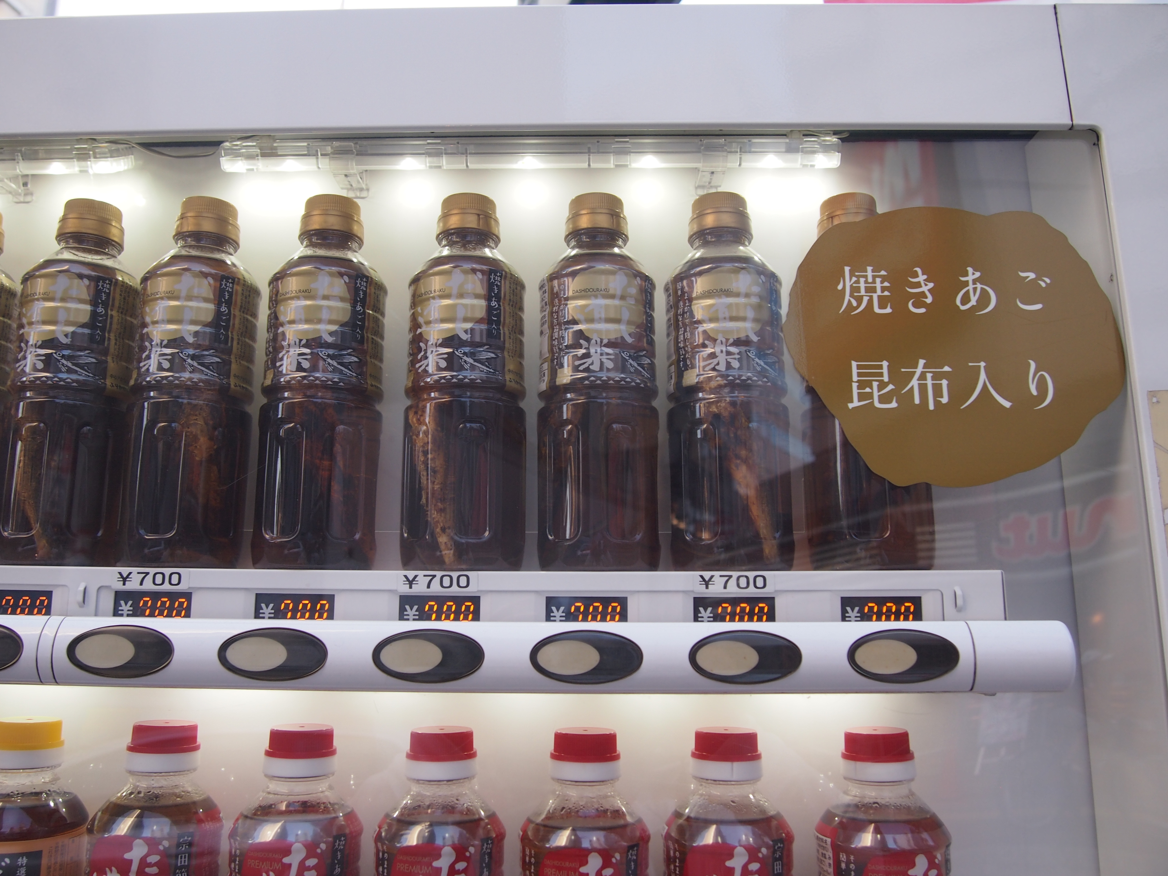 だし道楽 自販機